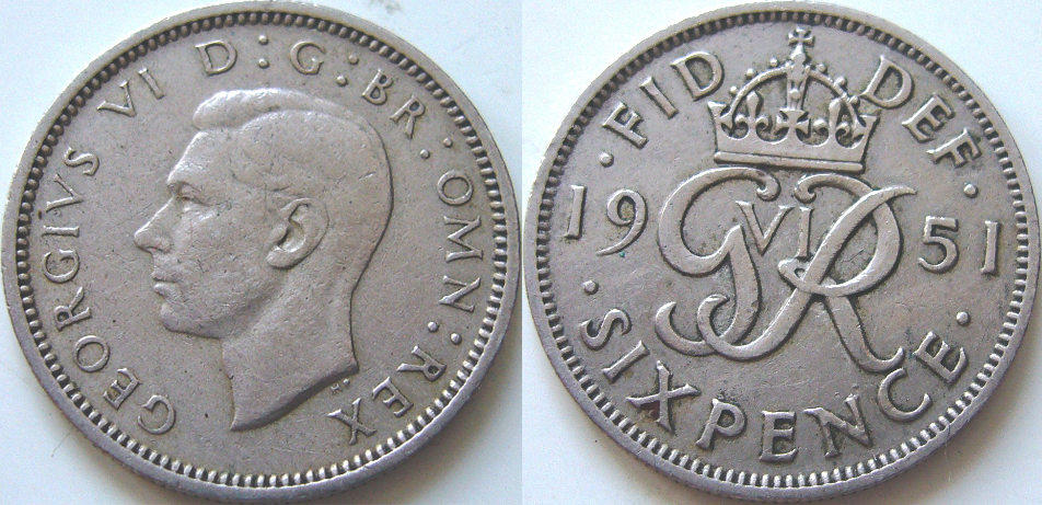 6 Pence 1951 Großbritannien King George VI